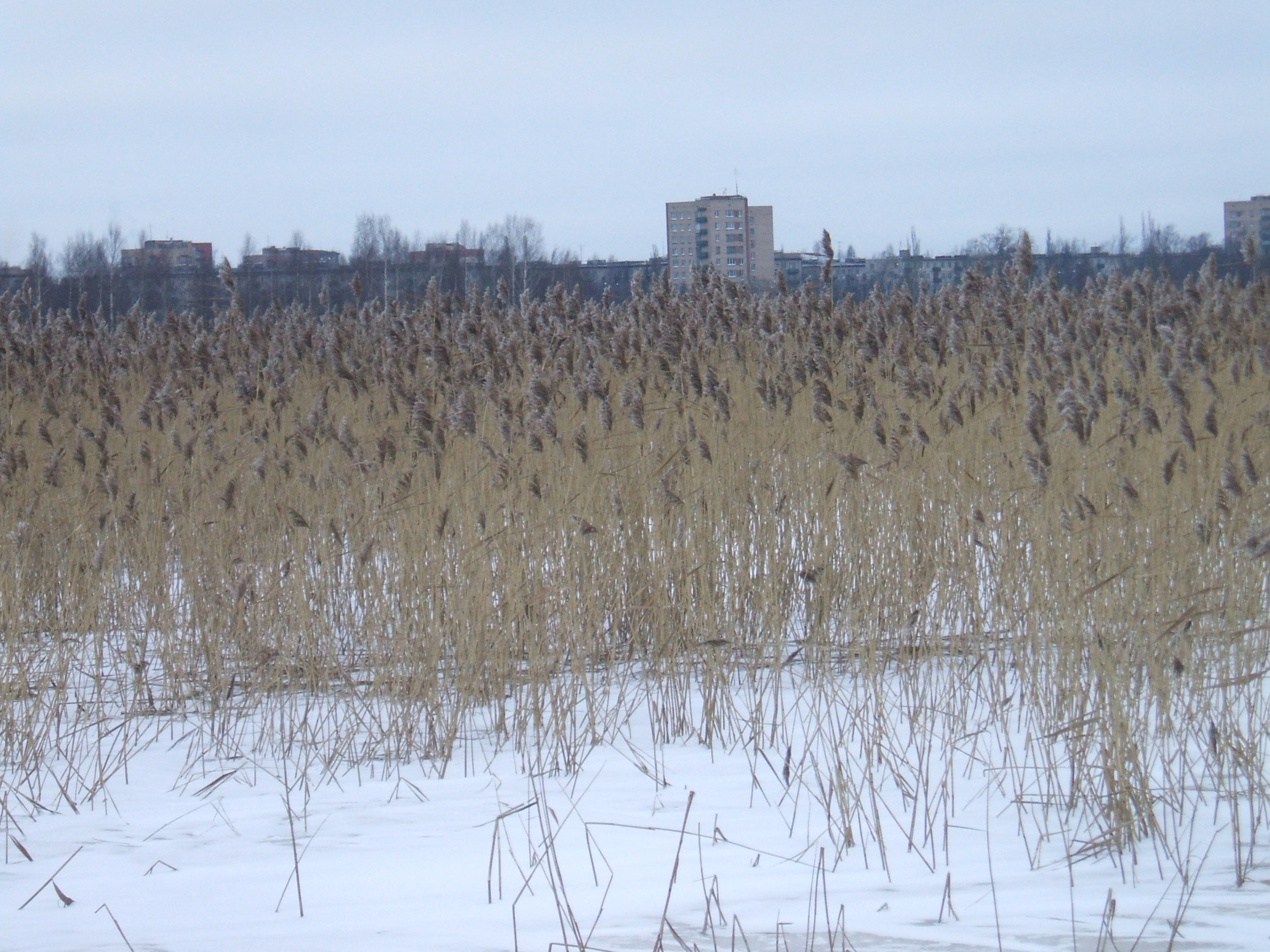 Высшая водная растительность на Сестрорецком Разливе